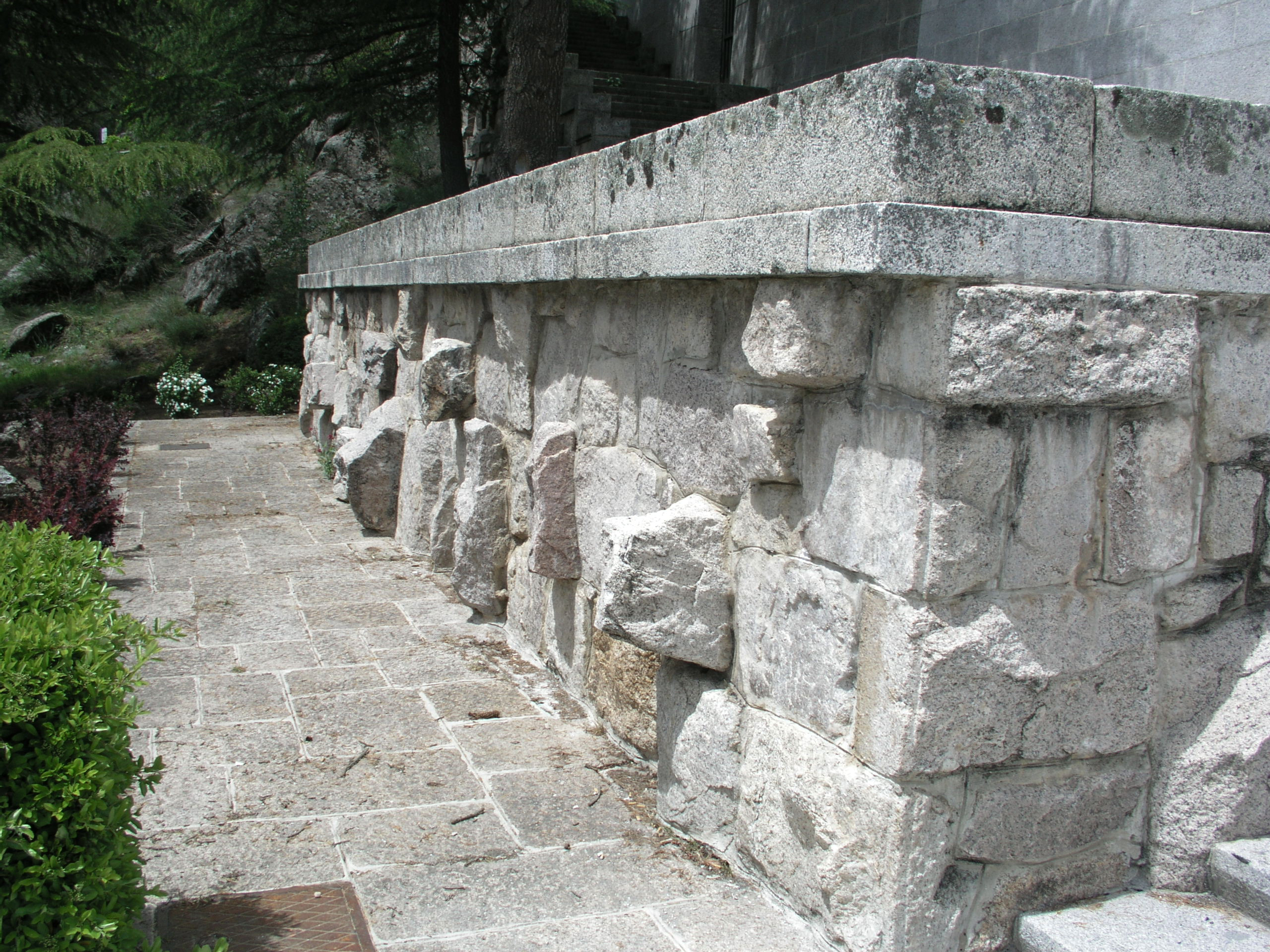 Valle de Los Caídos, Madrid, Spain. Stone wall, rustic.